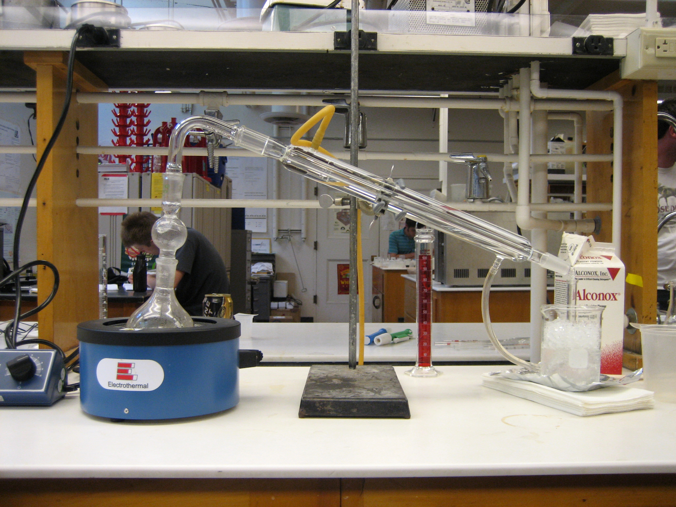 Distillation.